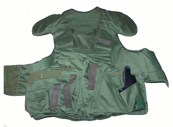 Schlagschutzweste Autor : TheHidden Quelle : Selbst fotografiert Markenbezeichung : Sitek Basisweste "Modell 22"